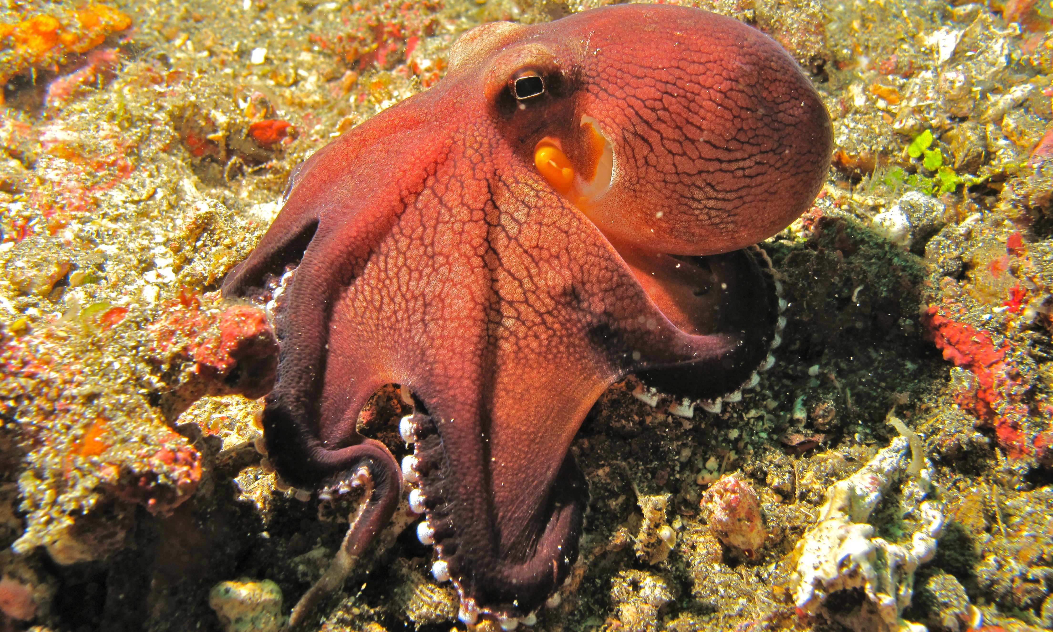 Makawide Island, Lembeh Strait, Sulawesi, INDONESIA